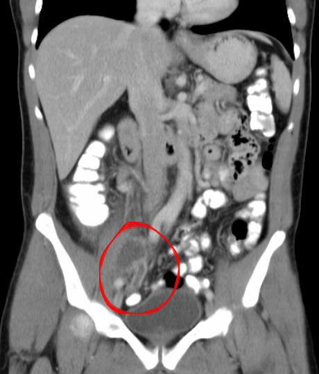 Appendizitis mit perityphlitischem Abszess in der Computertomographie - coronar. Man erkennt den Abszess mit deutlicher randständiger Kontrastmittelaufnahme sowie die anhängende entzündete Appendix.